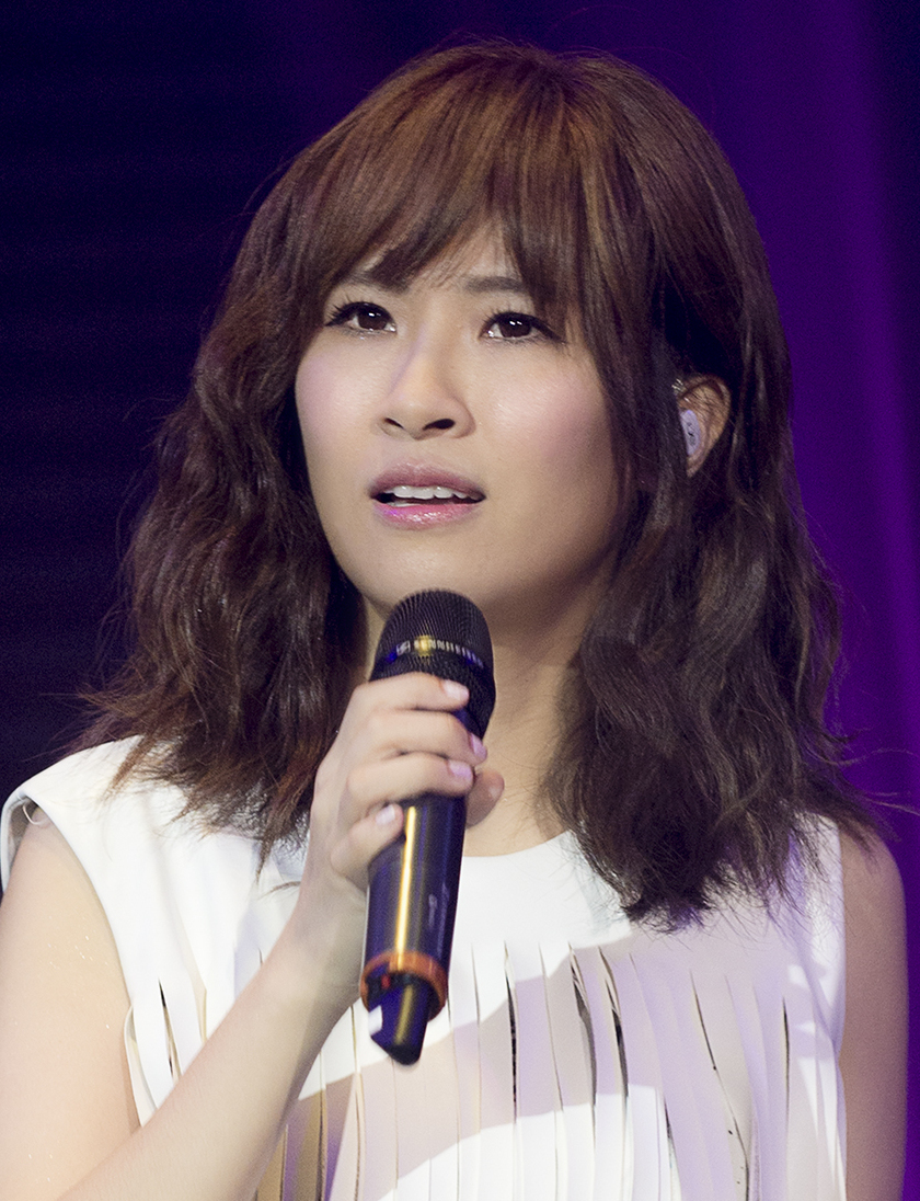 臺灣女歌手鄧福如。